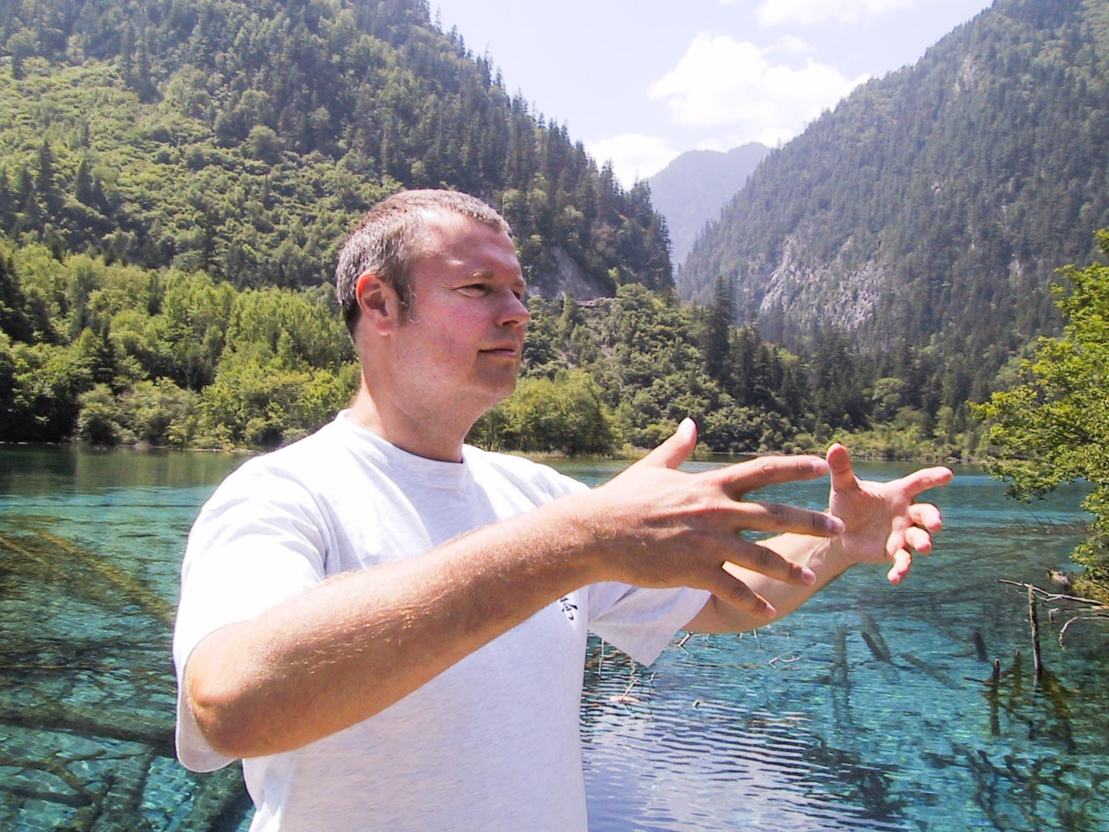 Thomas Apfel in Jiuzhaiguo, Sichuan